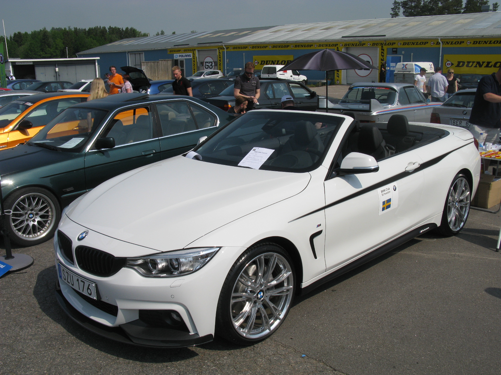 BMW 435i Cabriolet M Sport F33